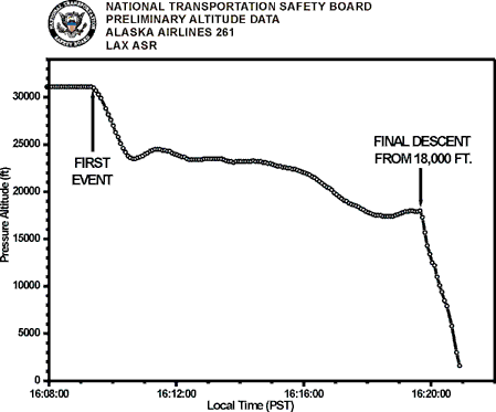 Ein Diagramm über die Flughöhe das Alaska Airlines Fluges 261